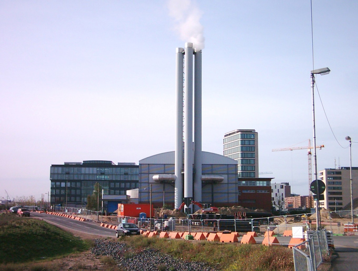 Vattenfall Brennstoffzellen-Heizwerk (245kW) in der HafenCity, Am Grasbrookhafen.